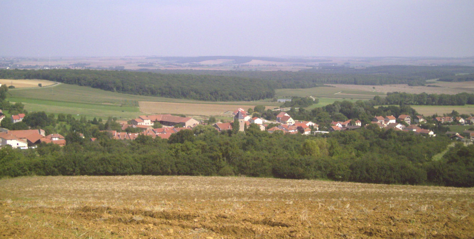 Vue depuis le mont Saint-Jean